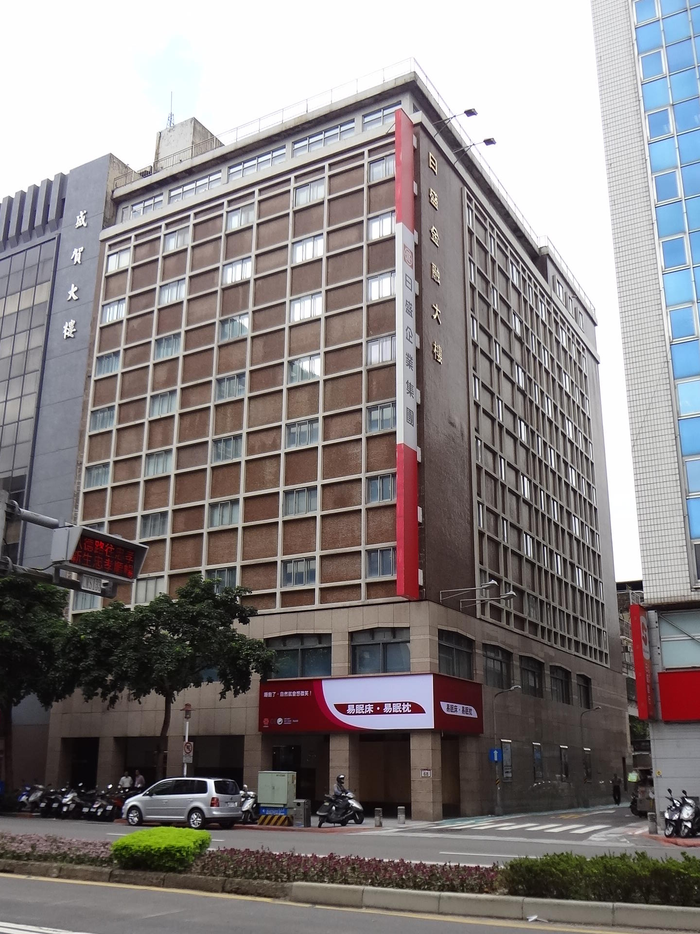 中文（台灣）: 日盛金融大樓，曾是日盛金控總部所在地，地址：臺北市中山區松江路68號。